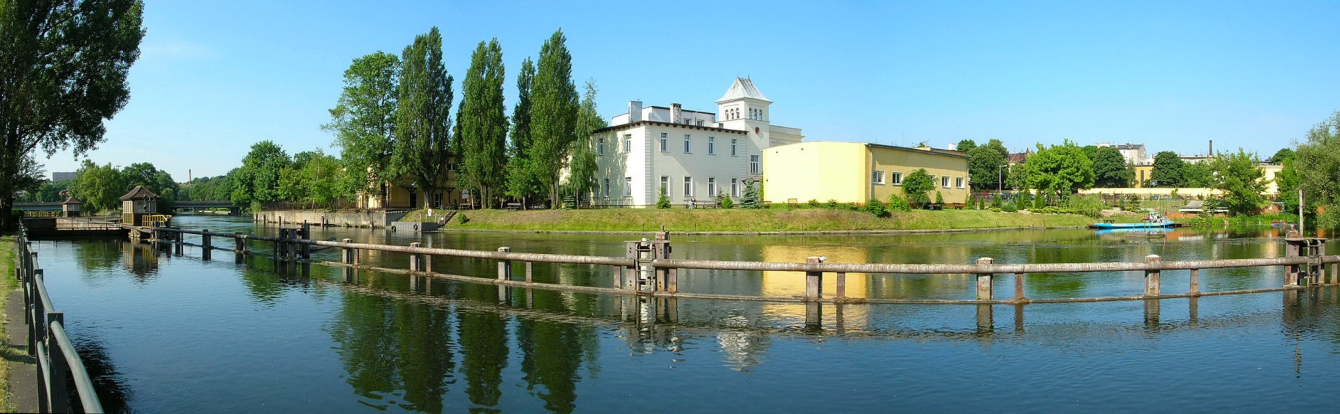 Brda w Bydgoszczy - śluza miejska i garbarnia Buchholza (WSG)